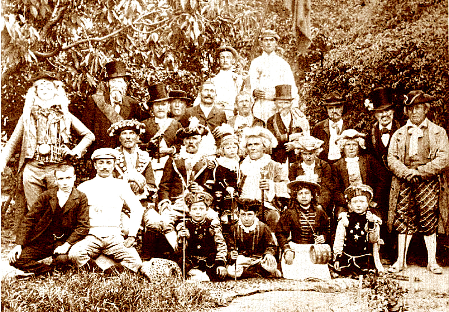 Fête du Carri en 1898